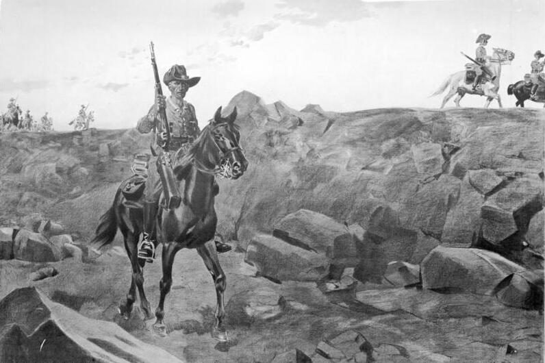 Deutsche Reiter in Südwest